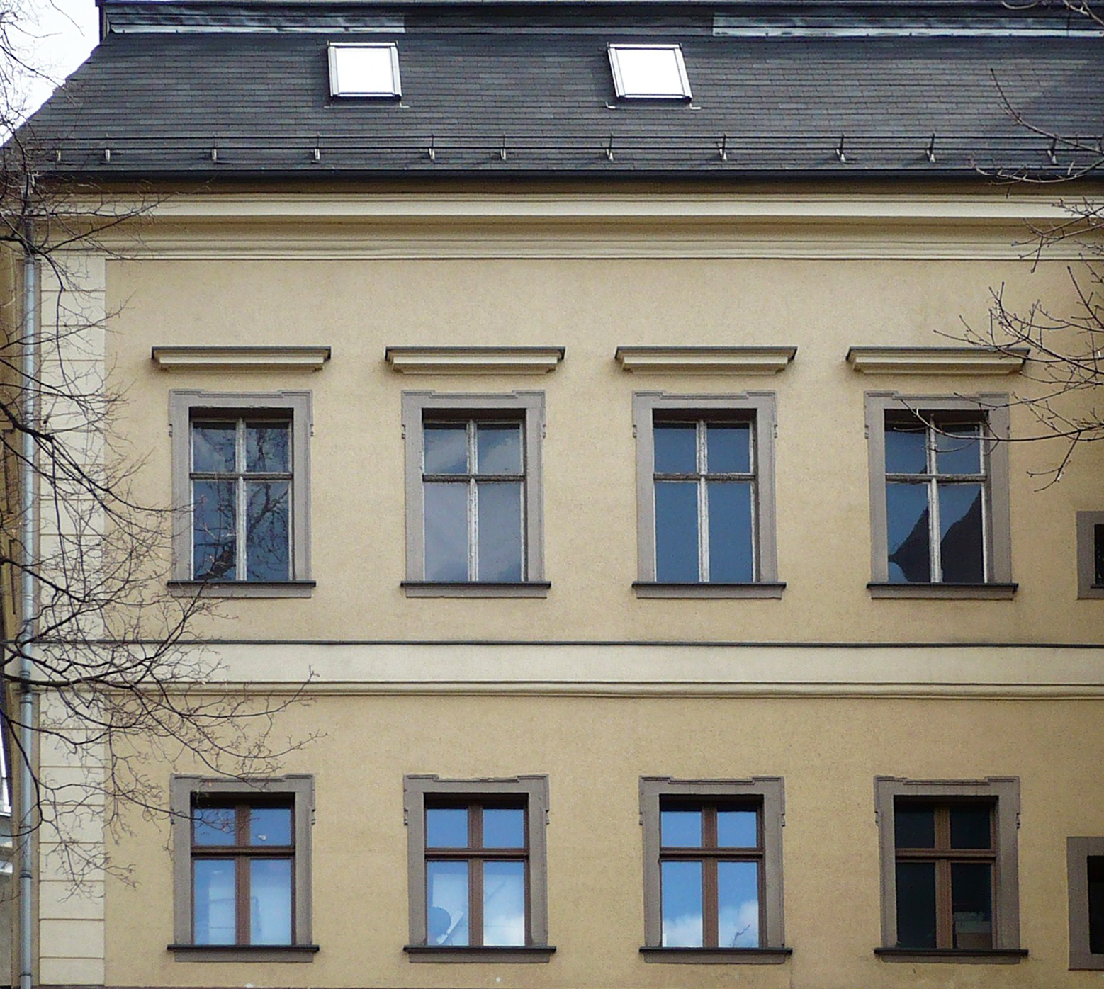 Nowa Ruda, ul. Piłsudskiego 2 - zamek Stillfriedów, obecnie biura, 1416, 1650, 1730 (zabytek nr A/935/1559 z 16.03.1966)